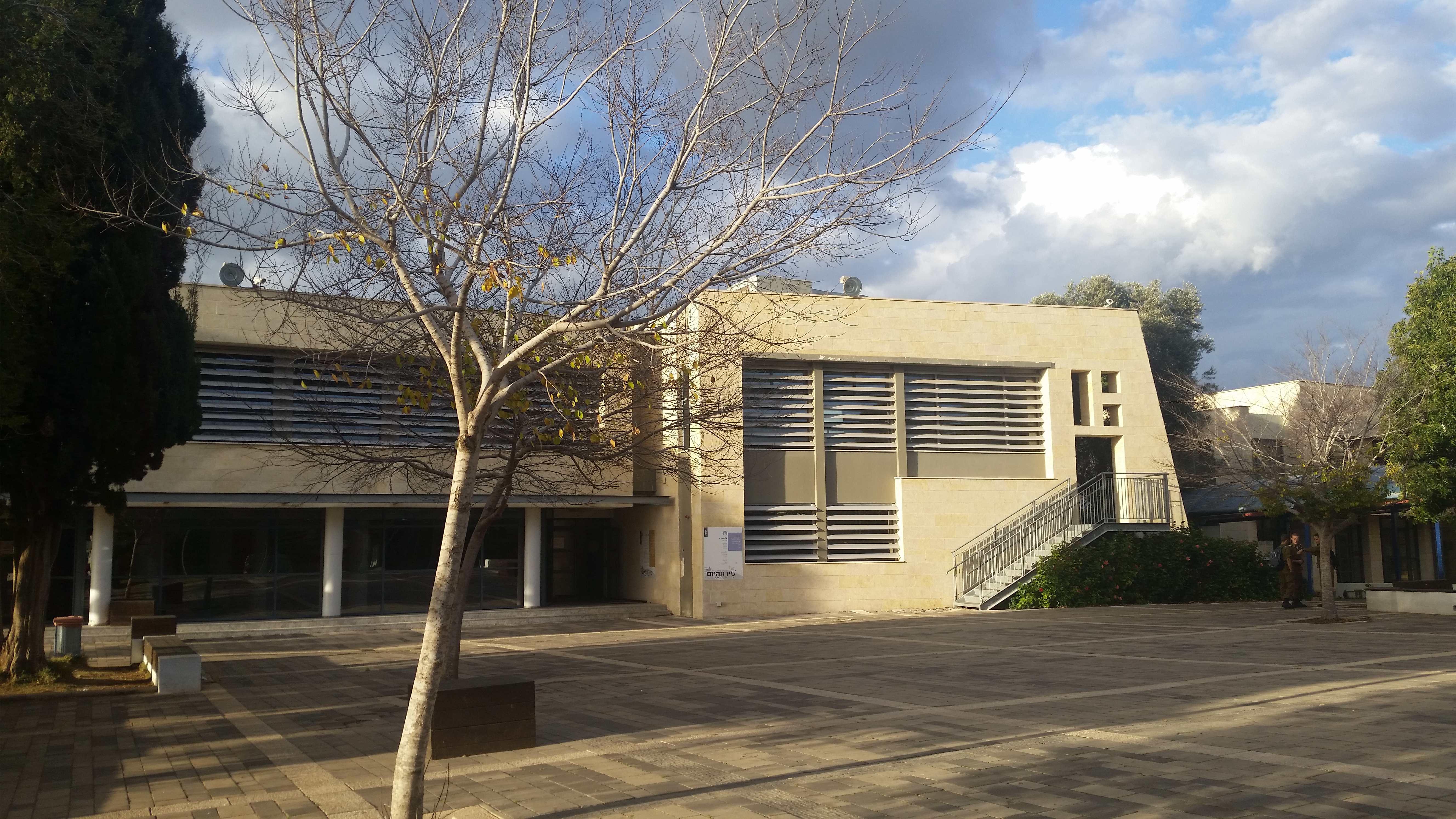 קמפוס בית בירם שוכן על הכרמל שייך לבית הספר הריאלי